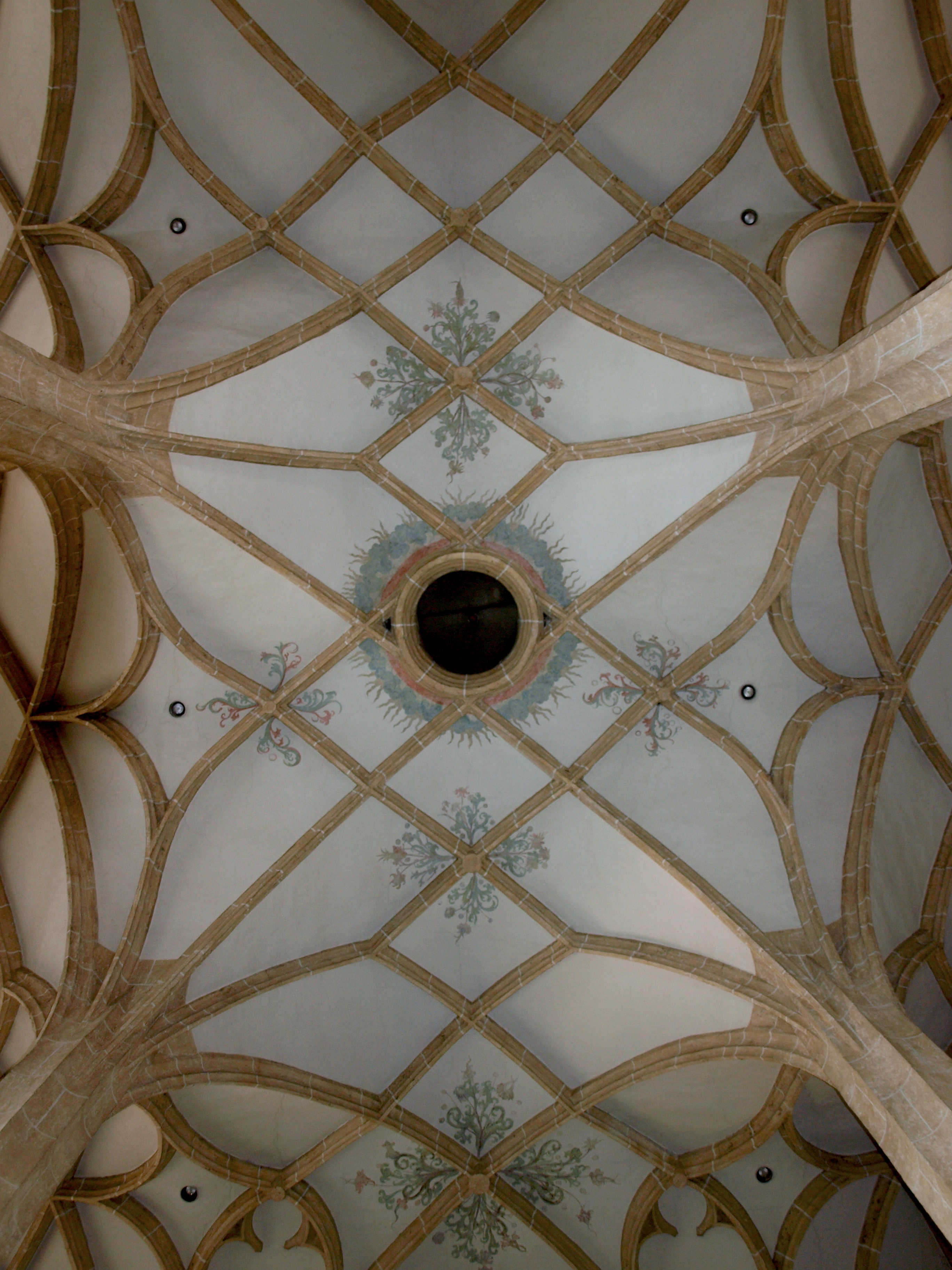 Kath. Pfarrkirche hl. Johannes der Täufer